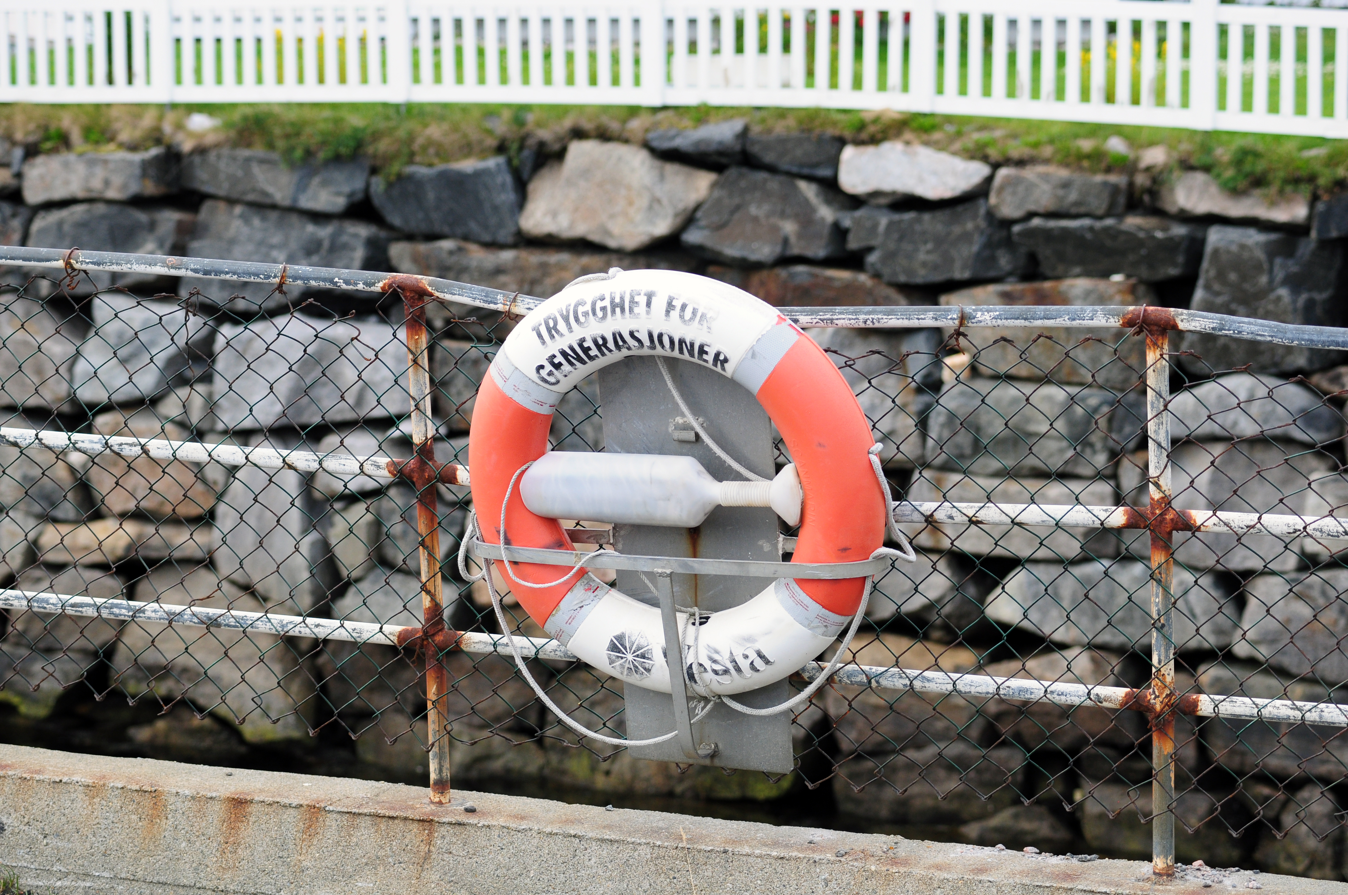 Норвегия